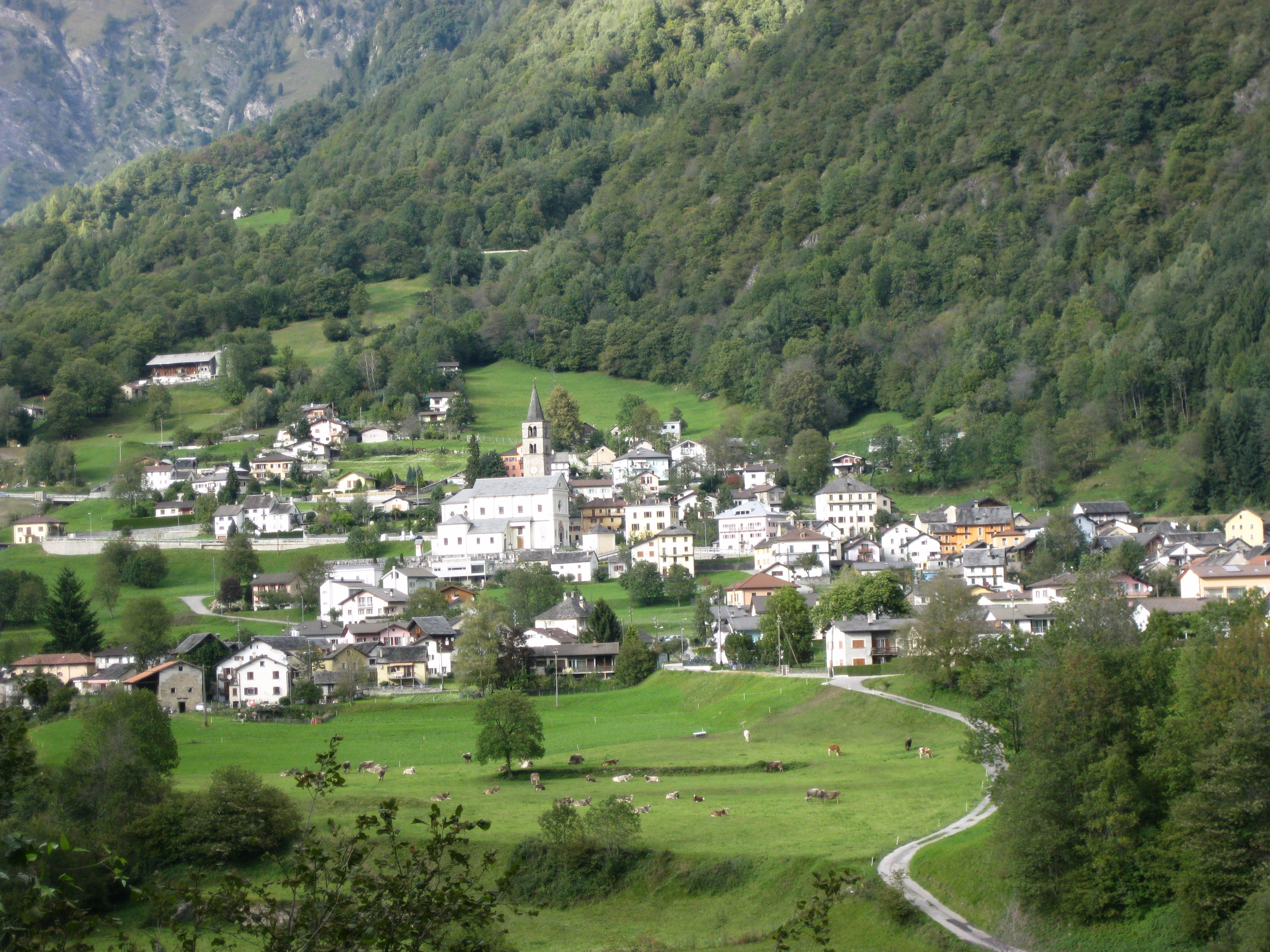 Aquila, ex-comune del canton Ticino.